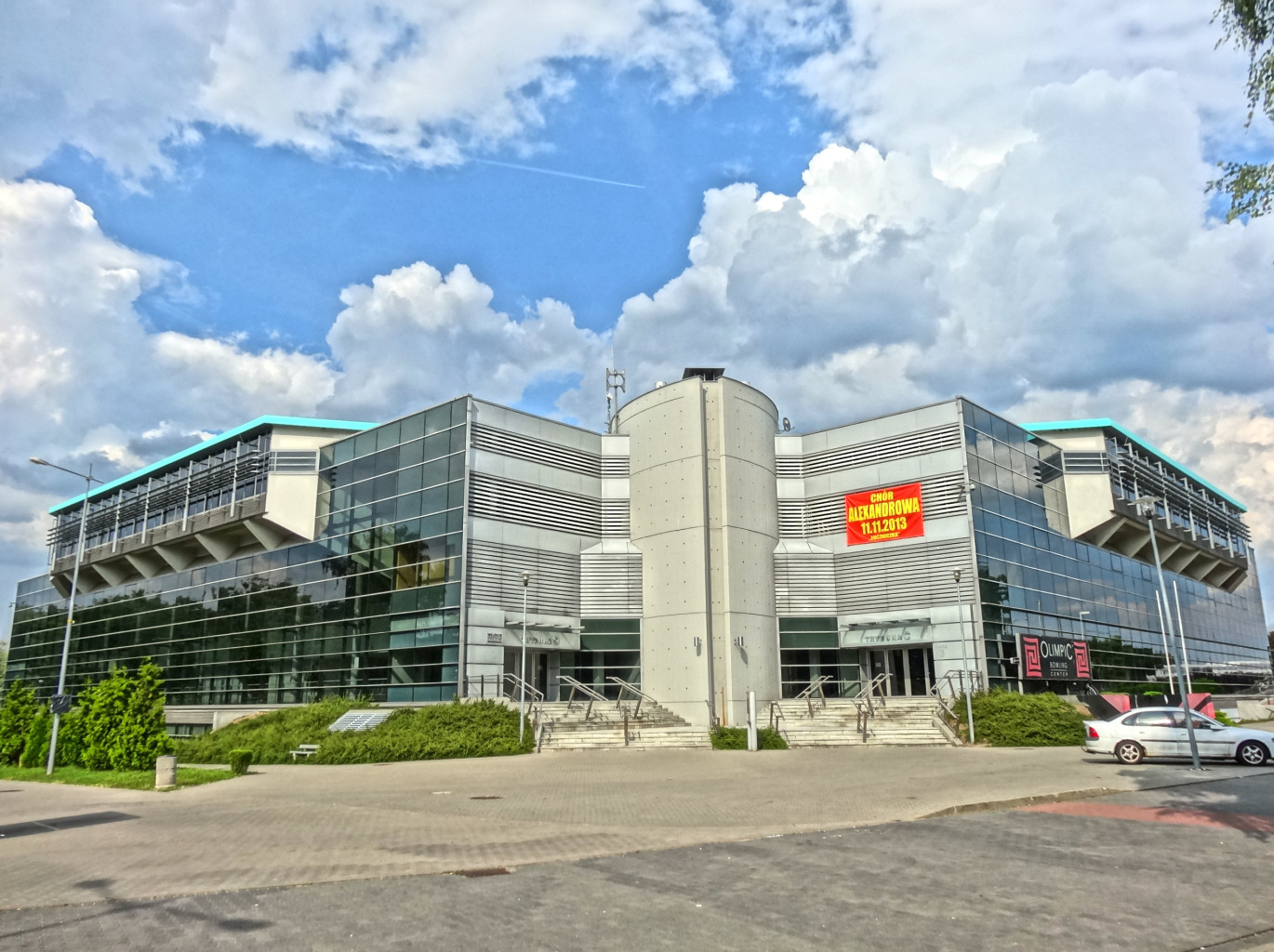 Hala widowiskowo-sportowa "Łuczniczka" w Bydgoszczy - widok od strony parkingu